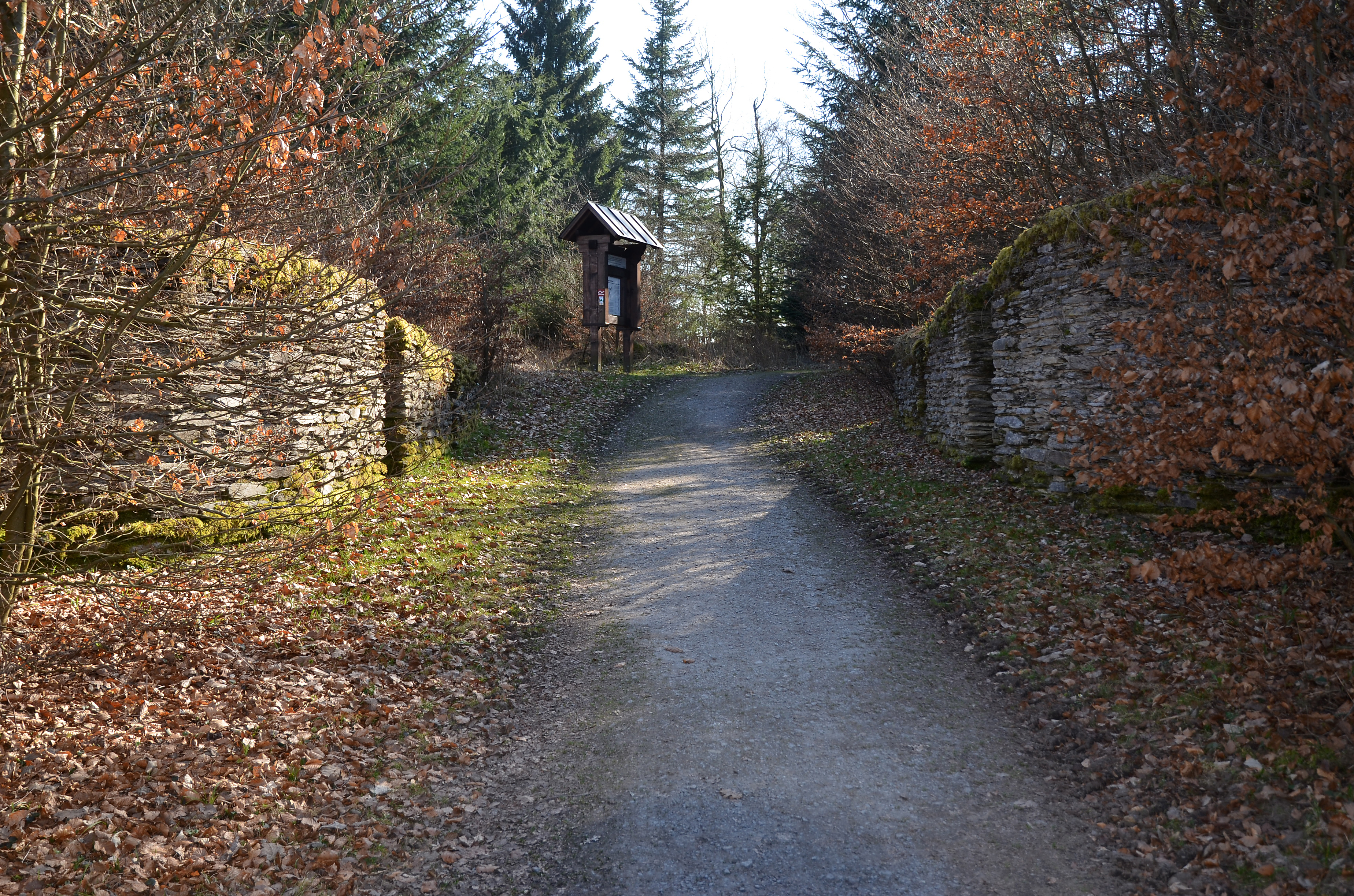 Blick von außerhalb der Wallanlage in Richtung Borbergs Kirchhof